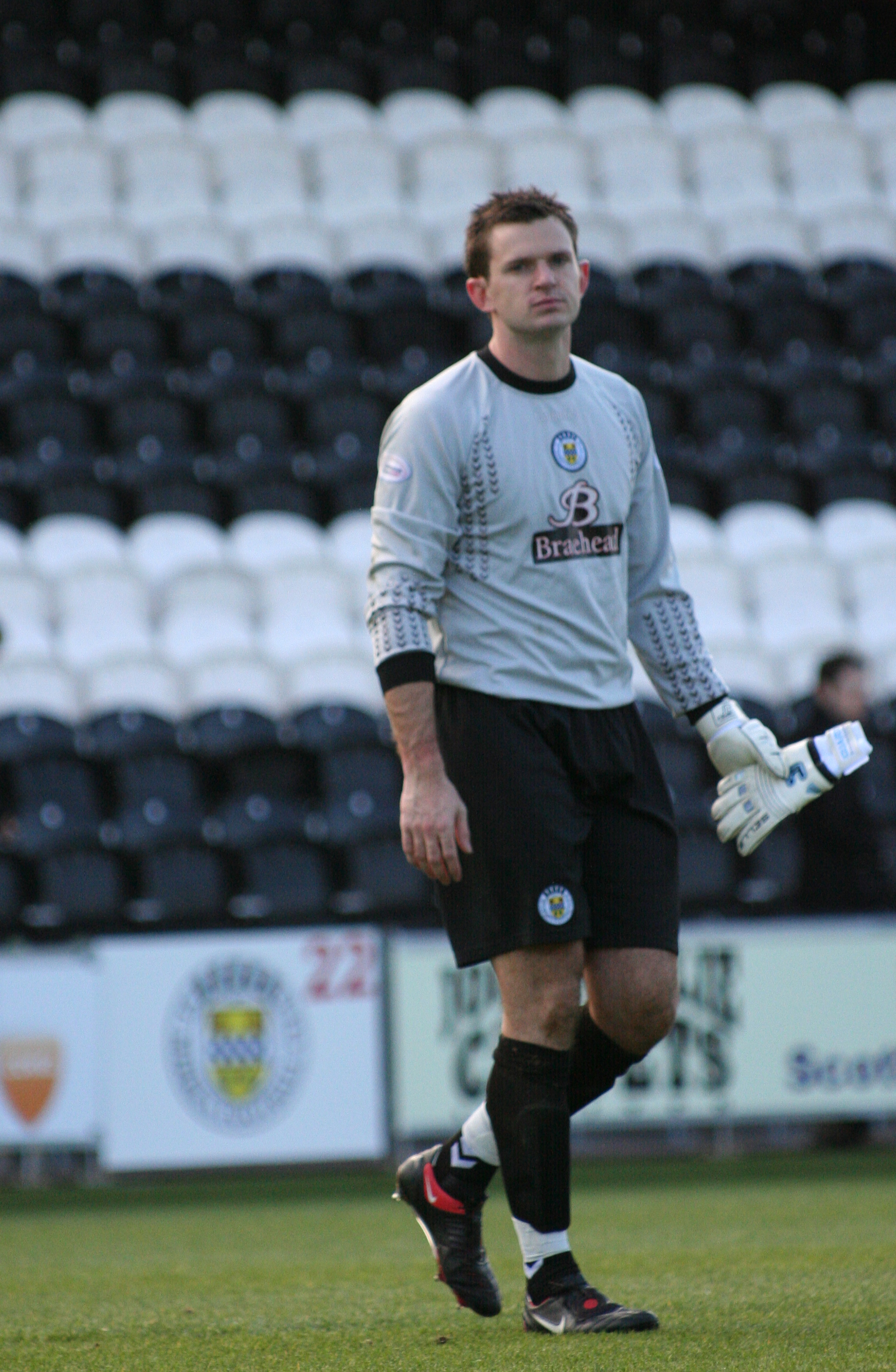 Gutted